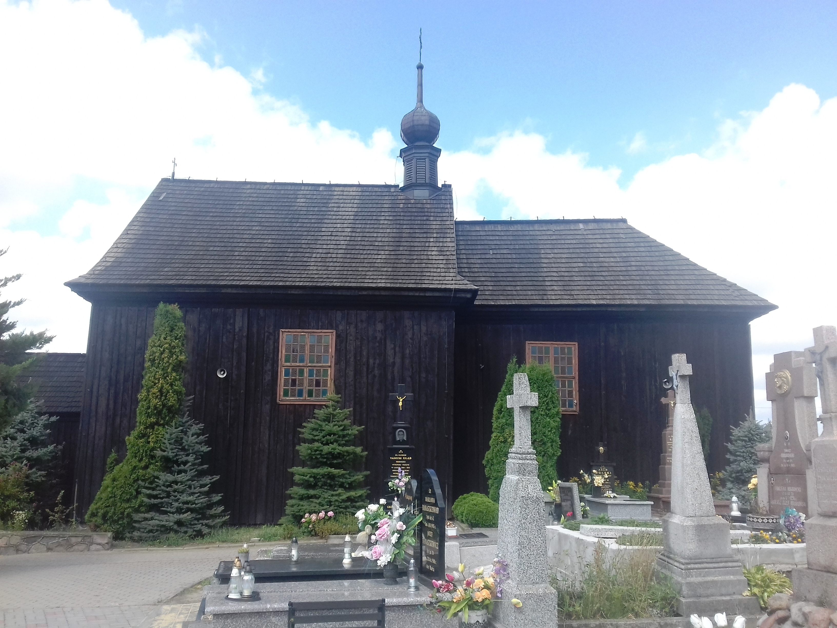 Jeżów (gm. Jeżów, pow. Brzeziny) - kościół cmentarny Św. Leonarda